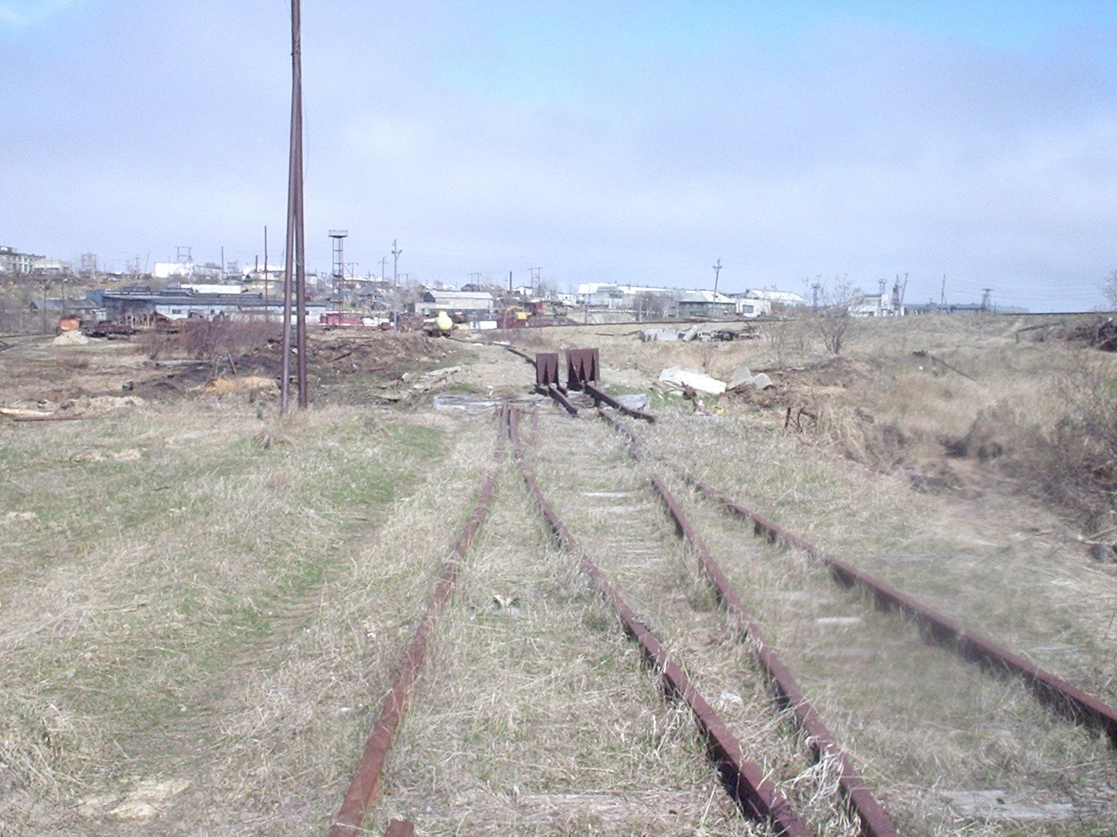 Сохранившиеся участки путей на станции Оха.